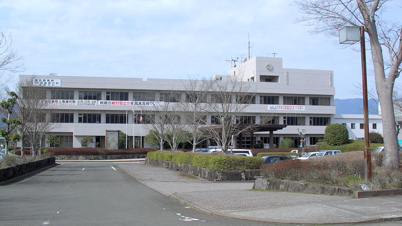 多良木町役場 外観 撮影者/著者/著作権保有者 : MK Products (本人がアップロード) 撮影日 : 2007/03/14 多良木駅用にアップロードした画像です。良い画像があれば別の画像に変えてください。